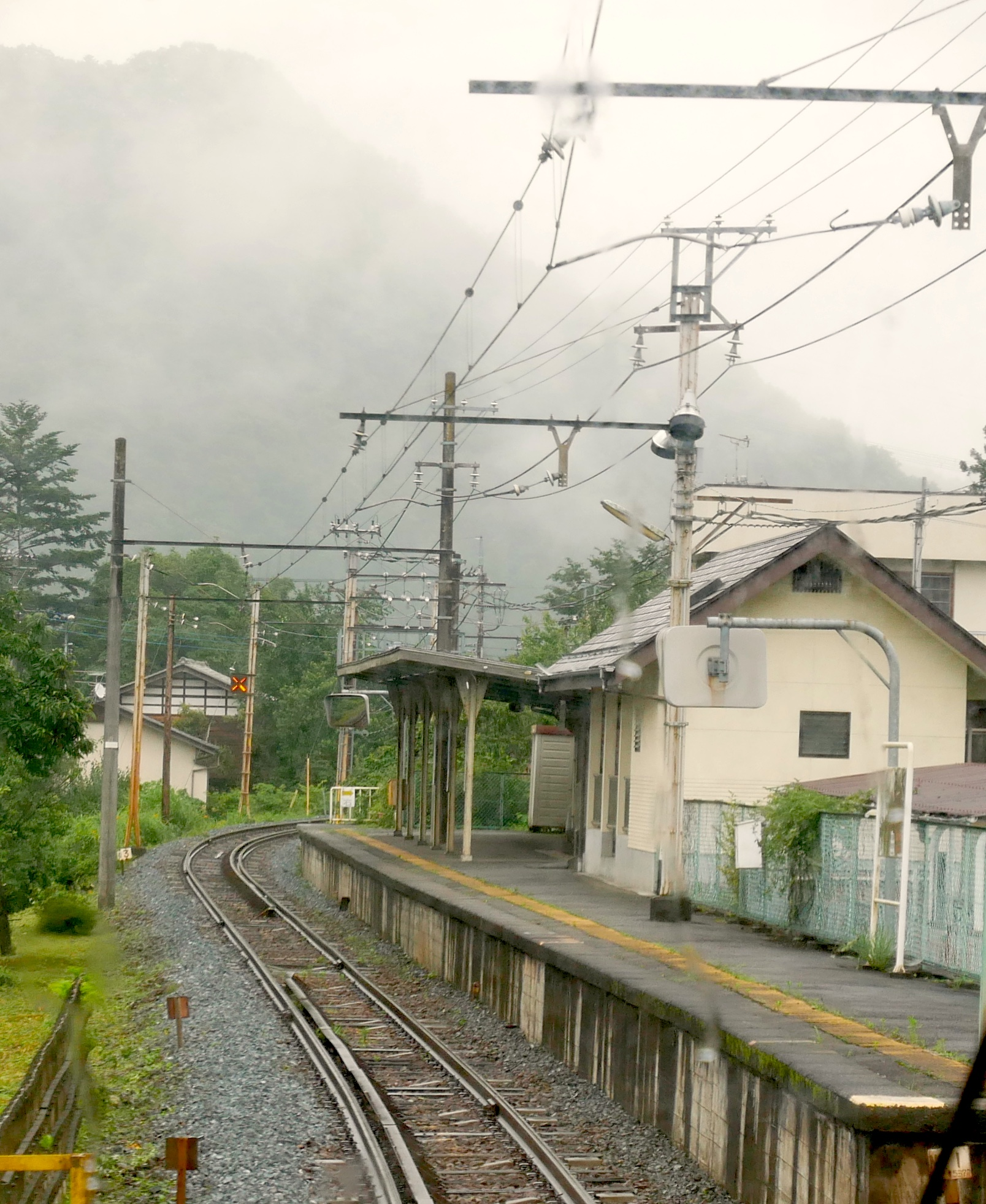 Shiroku Station (白久駅)